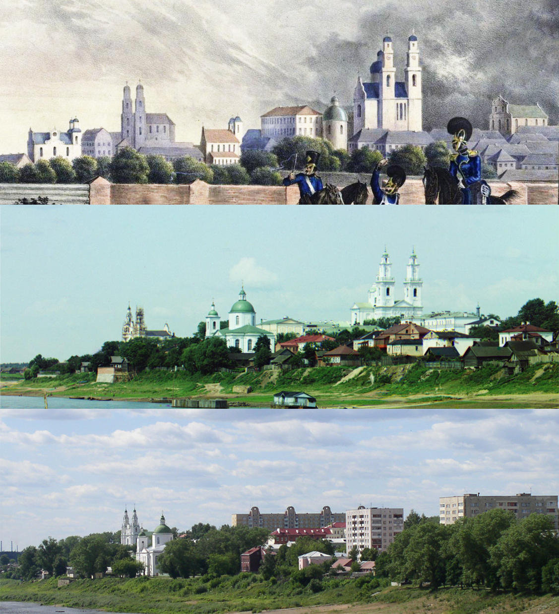 Беларуская (тарашкевіца): Маскалізацыя (русіфікацыя) Вялікага Княства Літоўскага. Места Полацак. Дэградацыя архітэктурнага аблічча ў выніку панаваньня Расейскай імпэрыі і СССР: да 1865 году расейскія ўлады зруйнавалі касьцёл францішканаў, у 1910-я гады — манастыр базылянаў; у 1940-я гады савецкія ўлады зруйнавалі касьцёл і кляштар дамініканаў, у 1964 годзе — узарвалі касьцёл езуітаў.